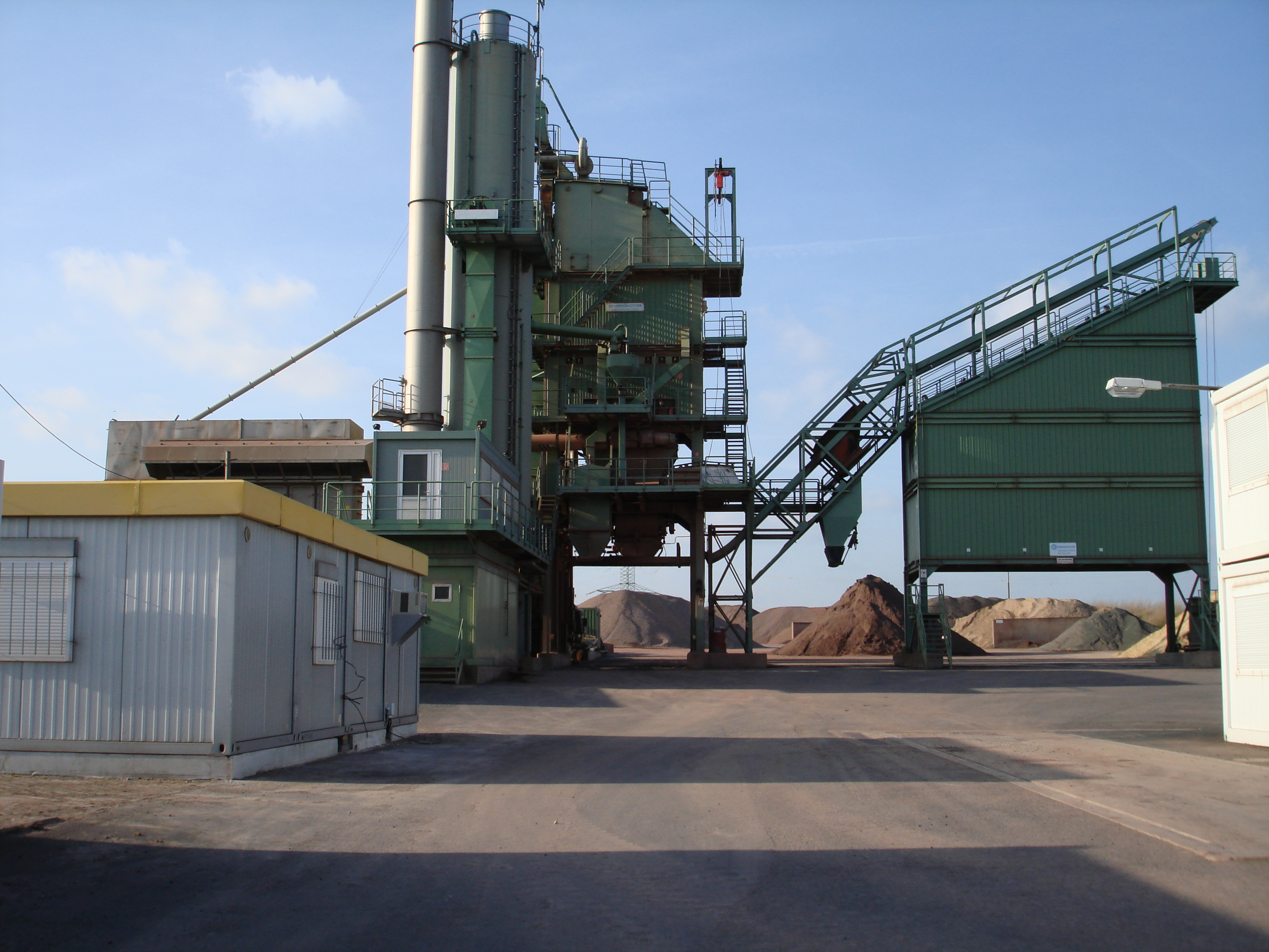 Gesamtansicht einer Asphaltmischanlage. Zu sehen sind unter anderem gerade aus die Siebeinheit mit Waagen- und Mischmodul. Rechts das Mischgutsilo.